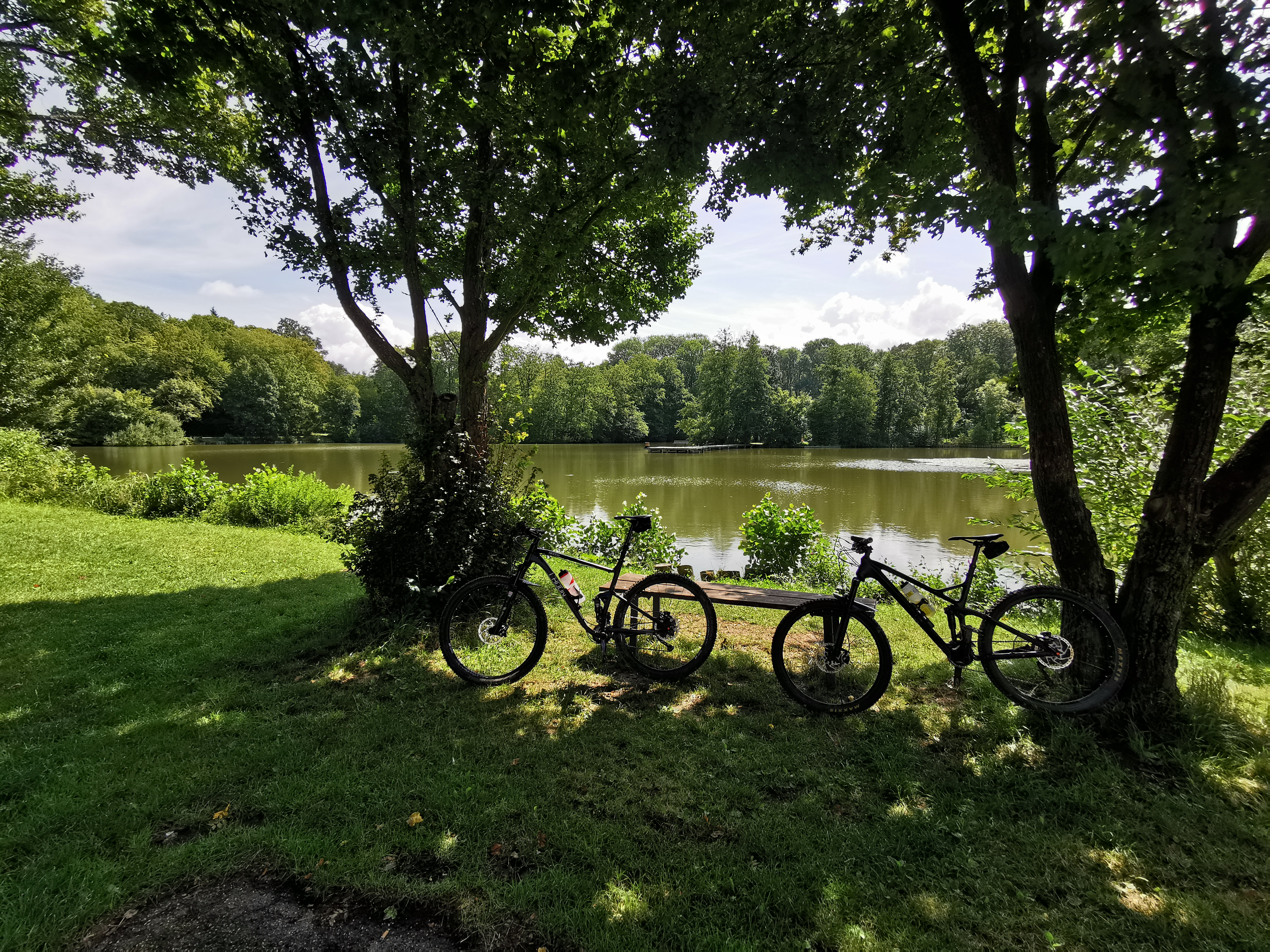 LT 04 – Mountainbiketour Lauda-Königshofen – Ostroute